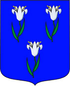 blason d'Ormesson (D'azur à trois lys de jardin d'argent, tigés et feuillés de sinople, 2 et 1)